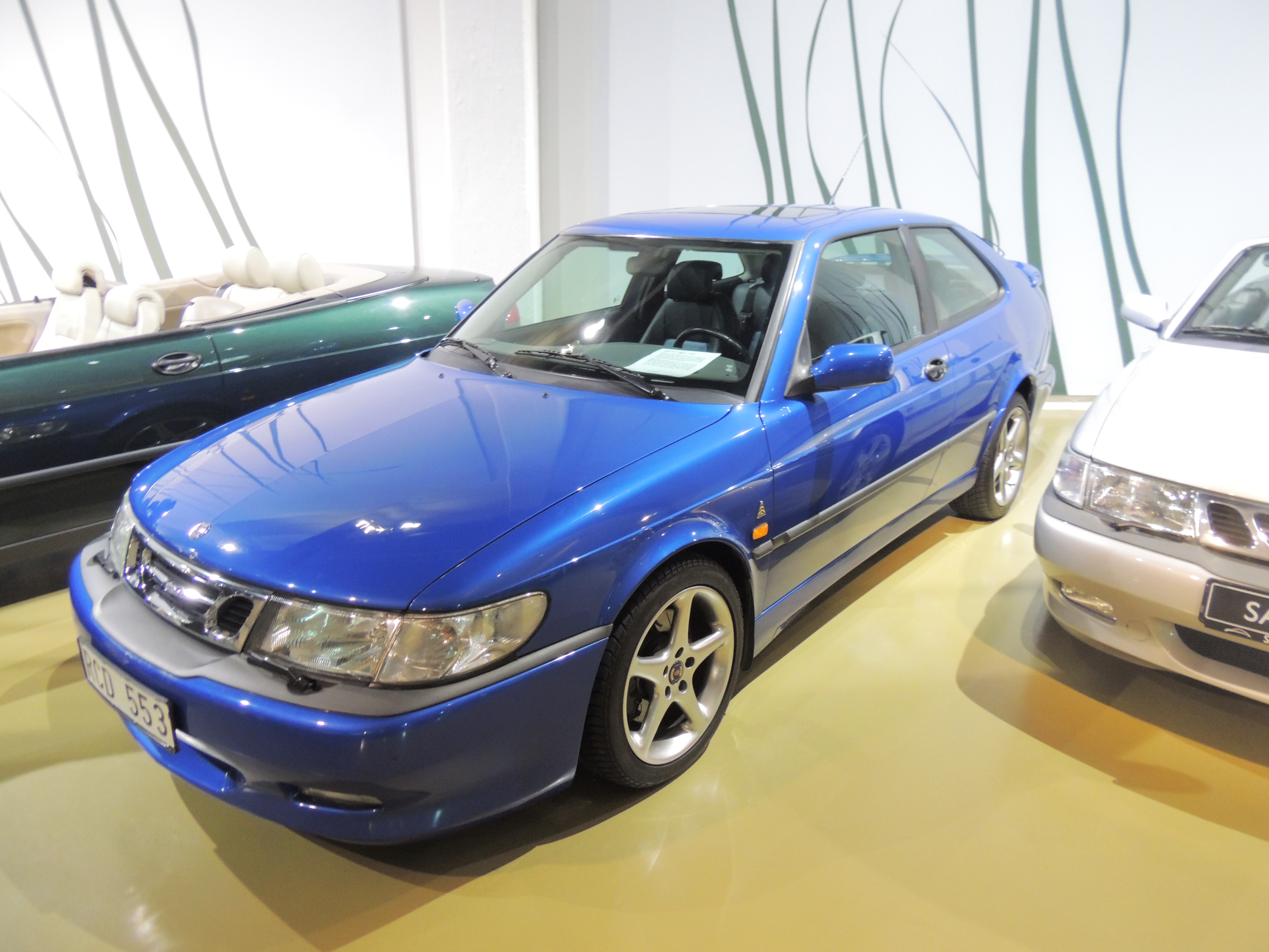 Saab 9-3 YS3E Viggen